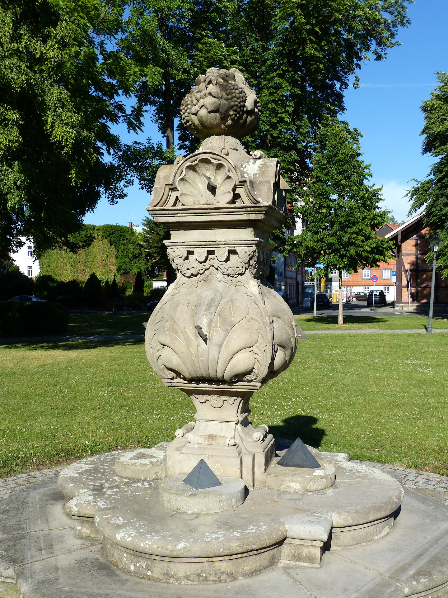 Gnomonischer Aufsatz mit 12 Sonnenuhren von J. F. Penther vor der Herzog August Bibliothek in Wolfenbüttel